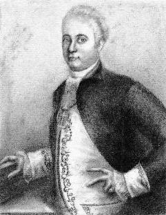 Cavaleiro da Ordem de Cristo e açoriano.